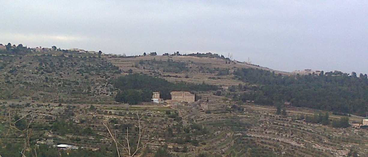 מנזר קרמיזן משכונת גילה